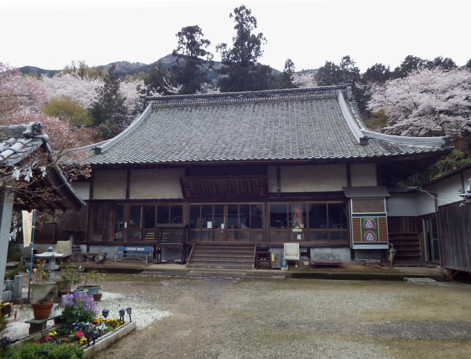 長善寺の本堂